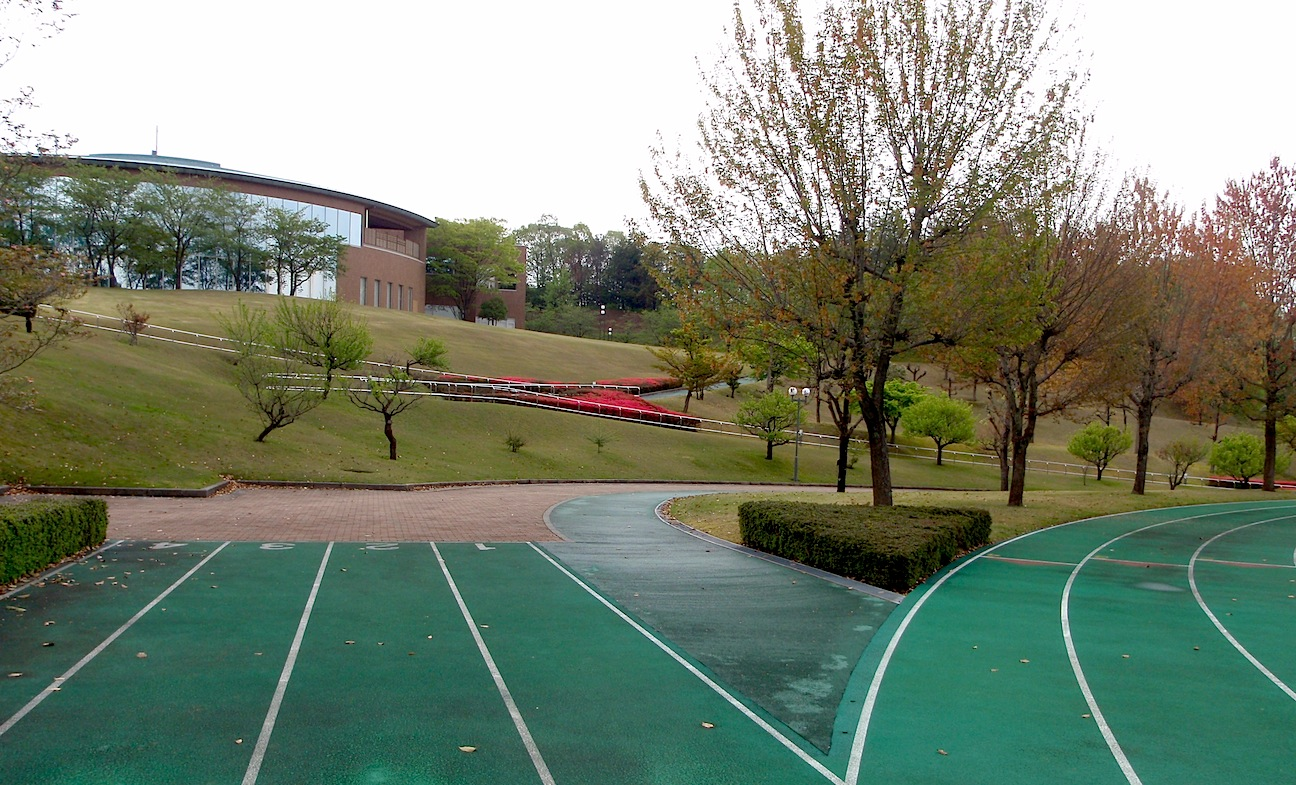 ふくい健康の森